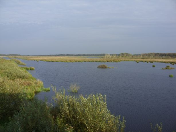 Polder Glies Blick vom Aussichtsturm